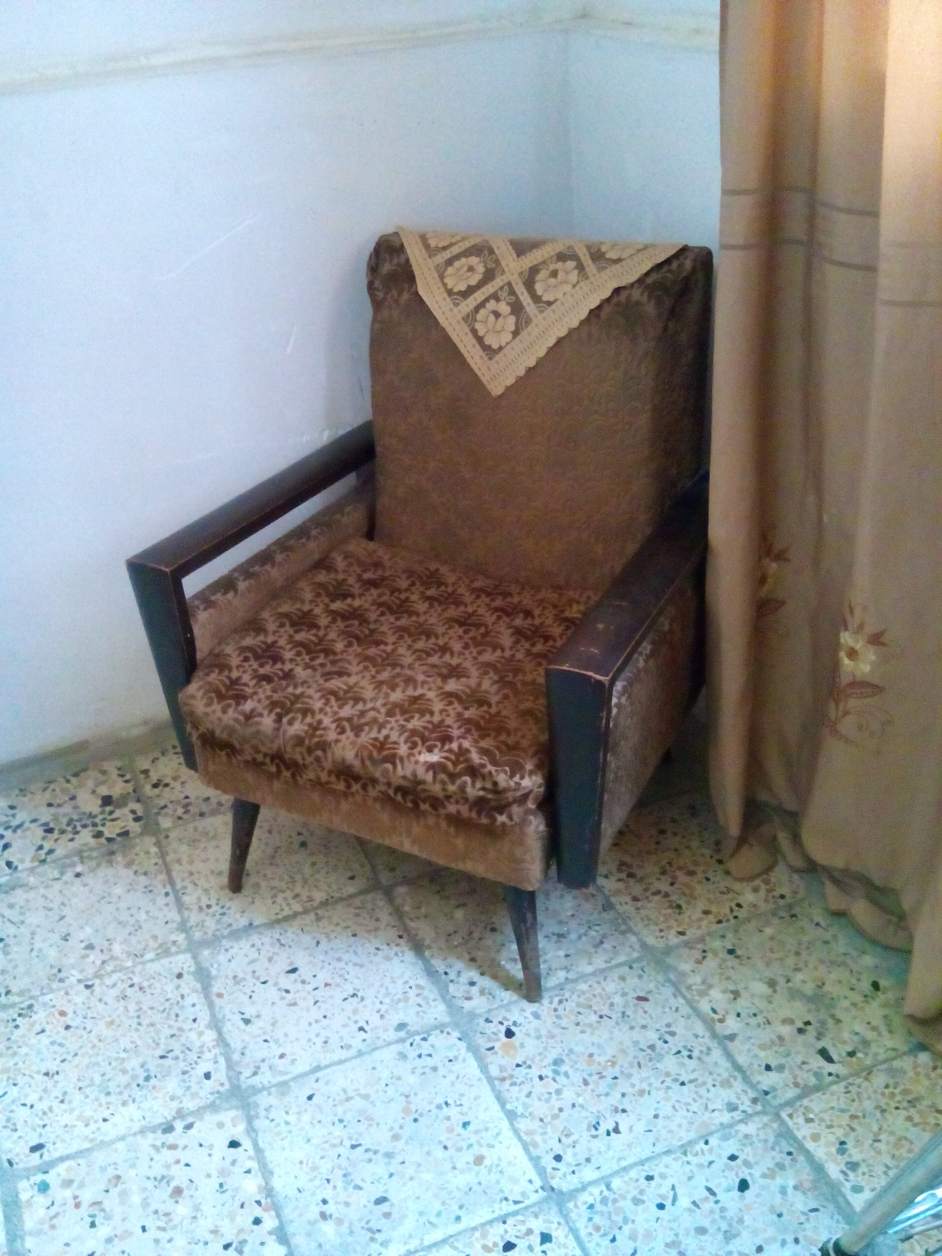 كرسي للجلوس صنع عام 1965 في بغداد